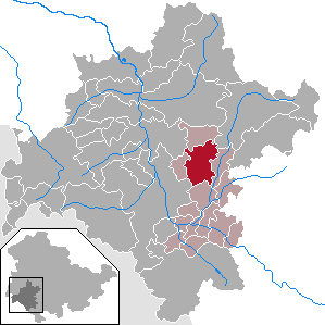 Kühndorf in Thuringia - District Schmalkalden-Meiningen